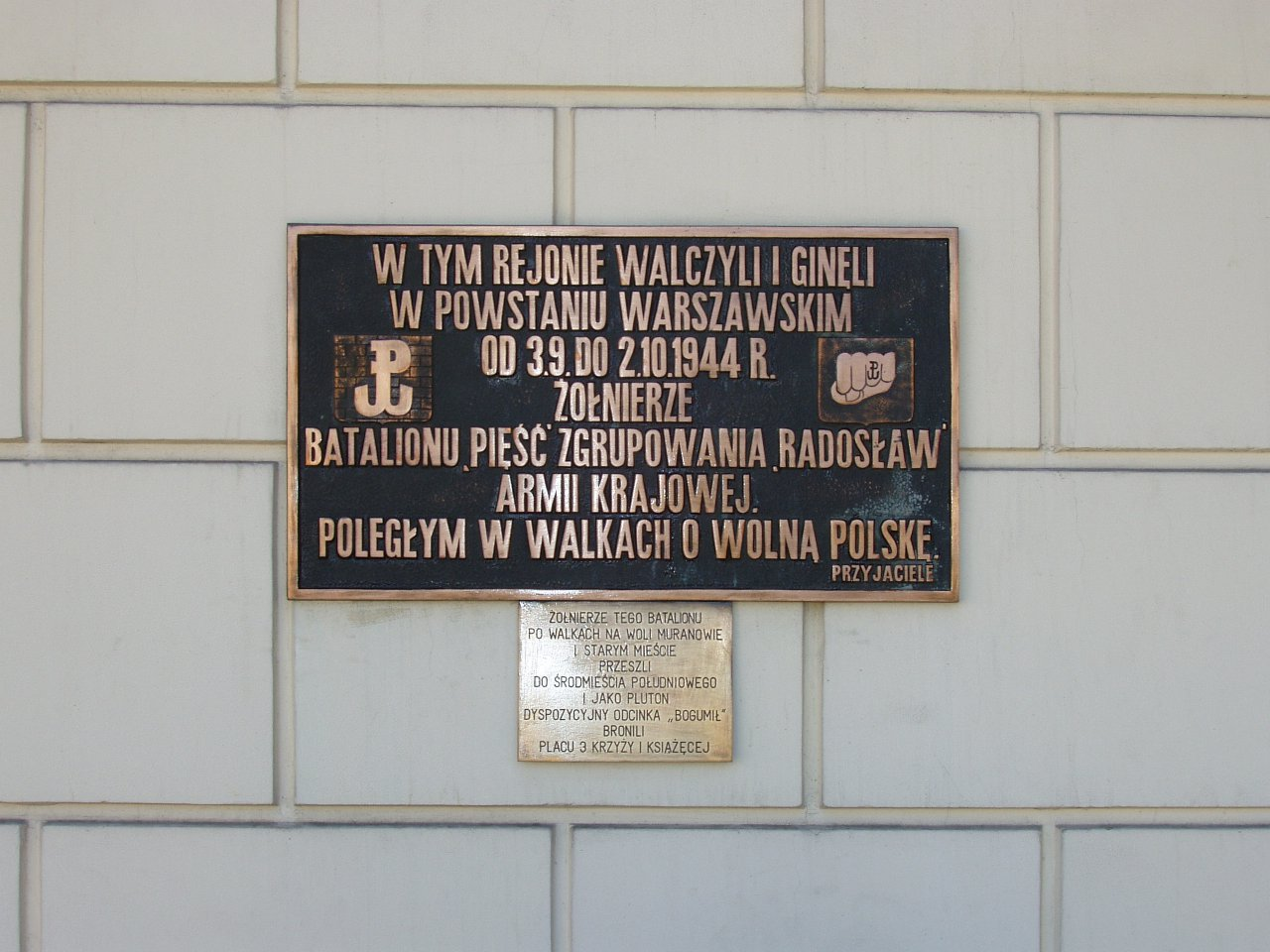 plac Trzech Krzyży 3 w Warszawie (fot Zu)